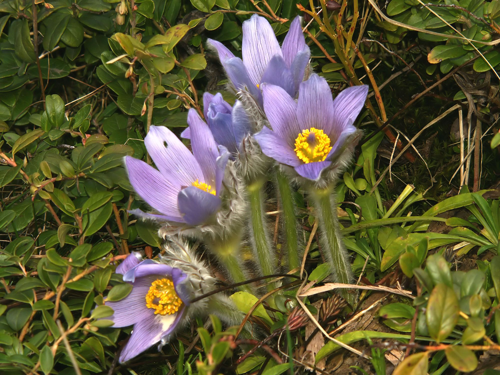 Pulsatilla grandis